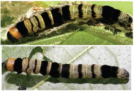 Ethmia turnerorum